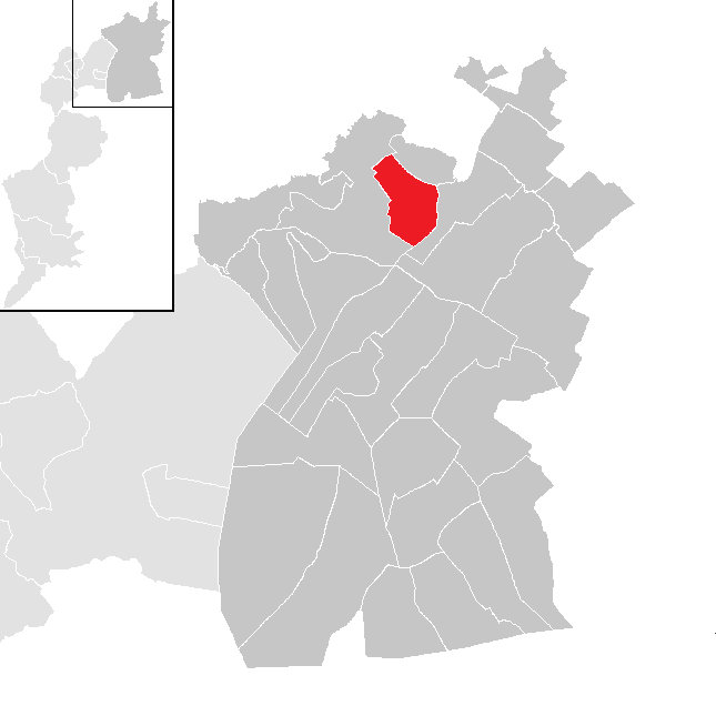 Bezirk Neudsiedl am See